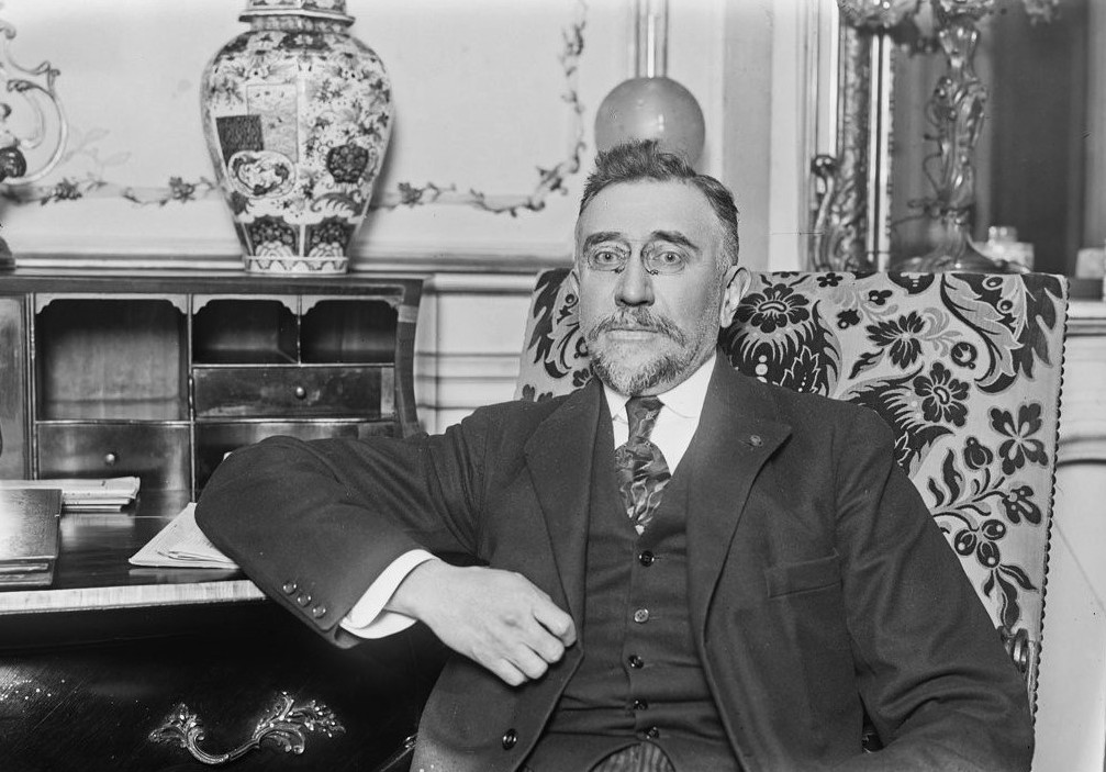 Titre : Professeur [Henri] Claude : [photographie de presse] / [Agence Rol] Auteur : Agence Rol. Agence photographique Date d'édition : 1922 Sujet : Claude, Henri (1869-1945) -- Portraits Sujet : Portraits -- 1914-1945 Type : image fixe,photographie Langue : Français français Format : 1 photogr. nég. sur verre ; 13 x 18 cm (sup.) Format : image/jpeg Droits : domaine public Identifiant : ark:/12148/btv1b53094799s Source : Bibliothèque nationale de France, département Estampes et photographie, EI-13 (960) Relation : Couverture : .. novembre 1922 Description : Référence bibliographique : Rol, 79880 Description : Appartient à l’ensemble documentaire : Pho20Rol Description : Image de presse Provenance : bnf.fr Date de mise en ligne : 20/04/2015